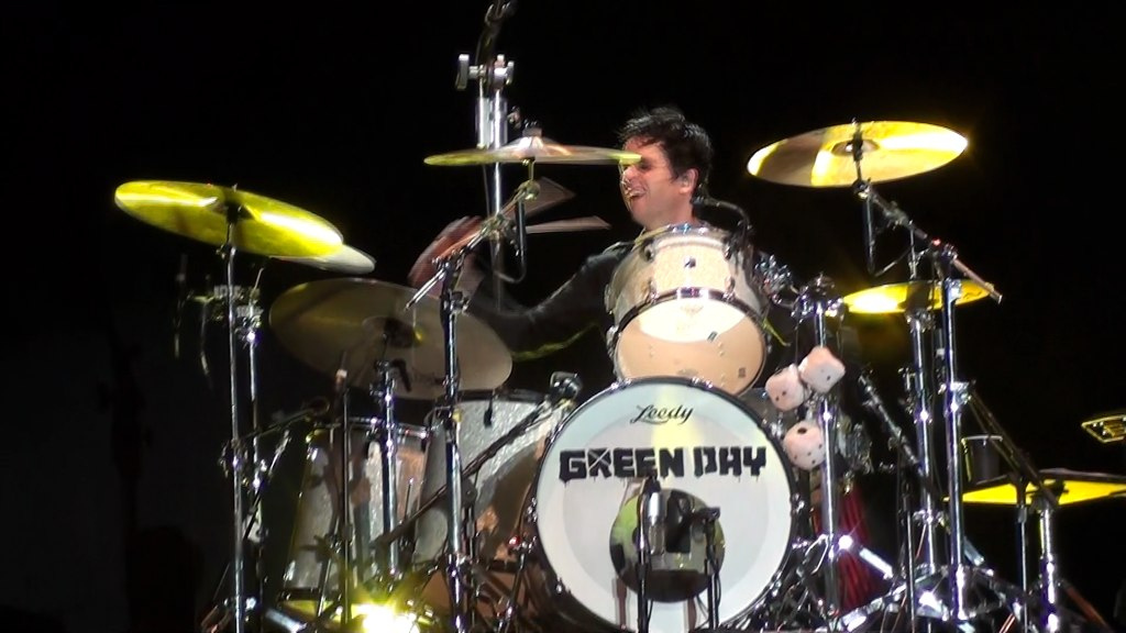 Billie Armstrong de Green Day tocando la batería en Venezuela.